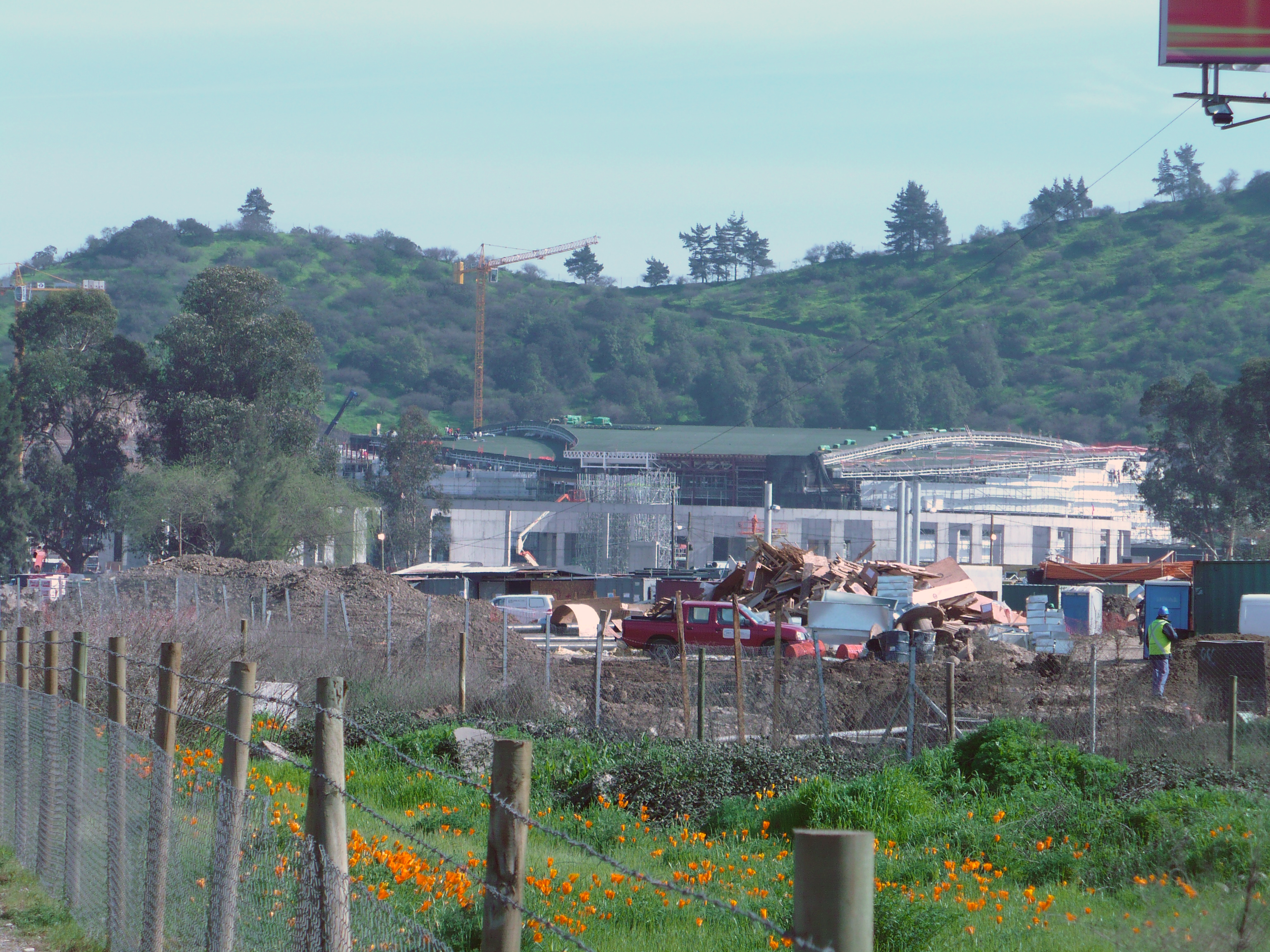 Monticello Gran Casino